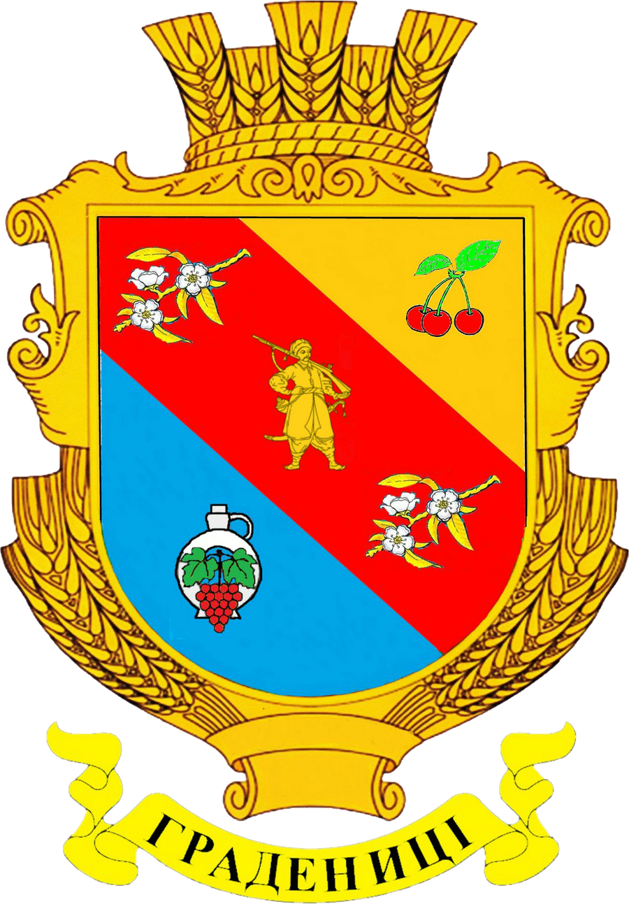 Герб села Градениці Біляївського району Одеської області